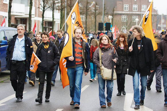 Mitglieder des Landesverbands Schleswig-Holstein bei der Demo gegen Rechts im November 2009 (1. von li.: Wolfgang Dudda, 2. von li.: Angelika Beer)